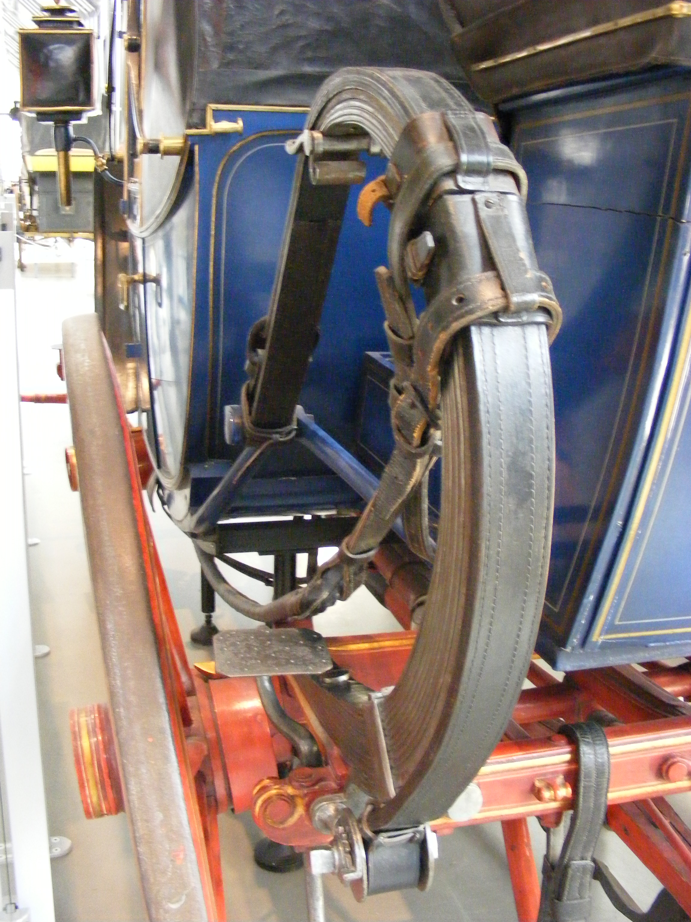 Reisewagen vom Typ Landauer (Pferdekutsche), erbaut von Nicolaus Koller, Wien, um 1825; zunächst vom Bayerischen Gesandten am Päpstlichen Hof, Karl Graf zu Spaur und Flavon verwendet; im Jahre 1848 wurde Papst Pius IX. damit befördert, als er aus Rom floh. Detail der heckseitigen Aufhängung mit Lederriemen he(Original-Erhaltungszustand) — Exponat im Deutschen Museum Verkehrszentrum München.